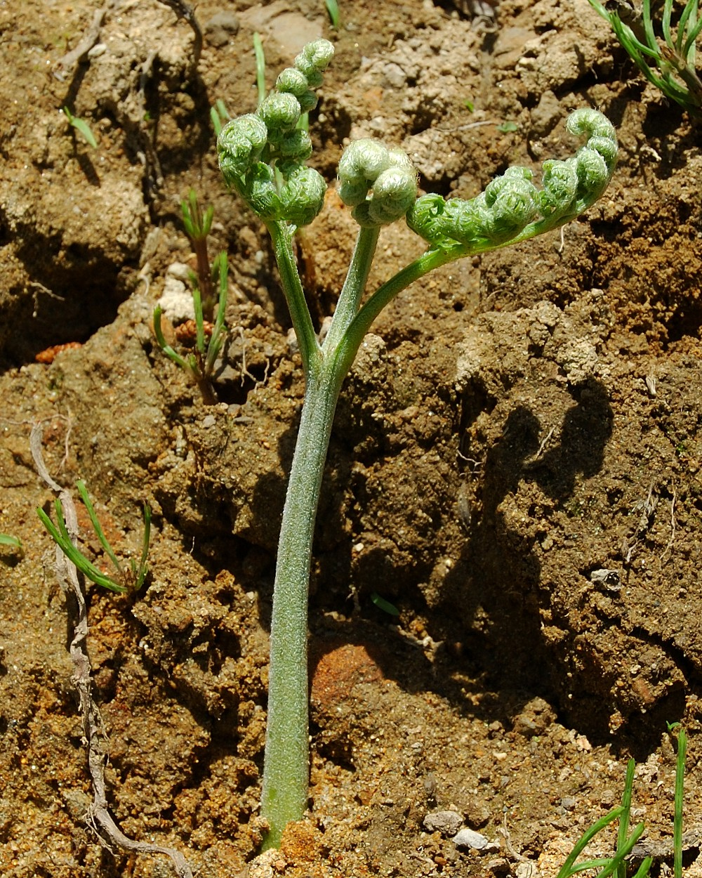 Pteridium aquilinum (Bracken,ワラビ)